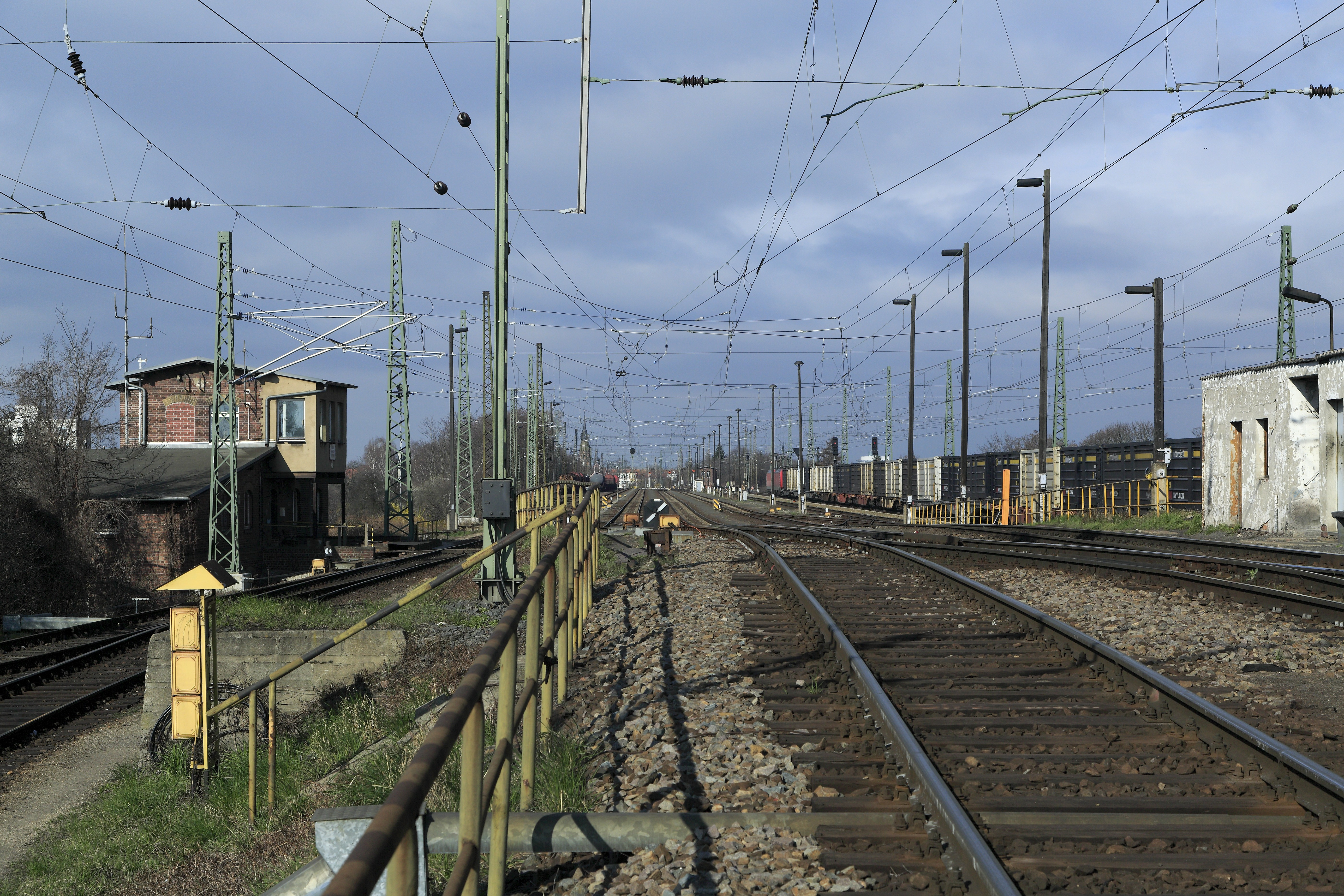 Von der Kuppe des Ablaufberges Richtung Westen, am Montag Vormittag ist die Einfahrgruppe bis auf zwei kurze Züge auf den Gleisen 16a und 16b (»Anna« und »Bertha«) noch leer. Der Ablaufbetrieb beginnt seit den 1990ern montags erst 14.00. Der Zug ganz rechts ist ein hier nicht behandelter kLv-Zug, der nur über das Gleis 11 Richtung Schönefeld fährt. Das ohne Signafahrtstellung auf dem Gegengleis, zwischen Engelsdorf und Schönefeld wurde bisher kein Gleiwechselbetrieb oder signalisierter Falschfahrbetrieb eingerichtet. Links im Hintergrund das Stellwerk 2, das Teil eines deutlich größeren Dienstgebäudes am Hang des Bahndammes ist. Der verputzte Anbau entstand nach einem Unfall, bei dem der ursprüngliche weggefahren wurde. Er war allerdings deutlich länger. Bis 1971 war das Stellwerk 2 das Befehlsstellwerk auf dem Westberg, seitdem ist das das Stellwerk 1.